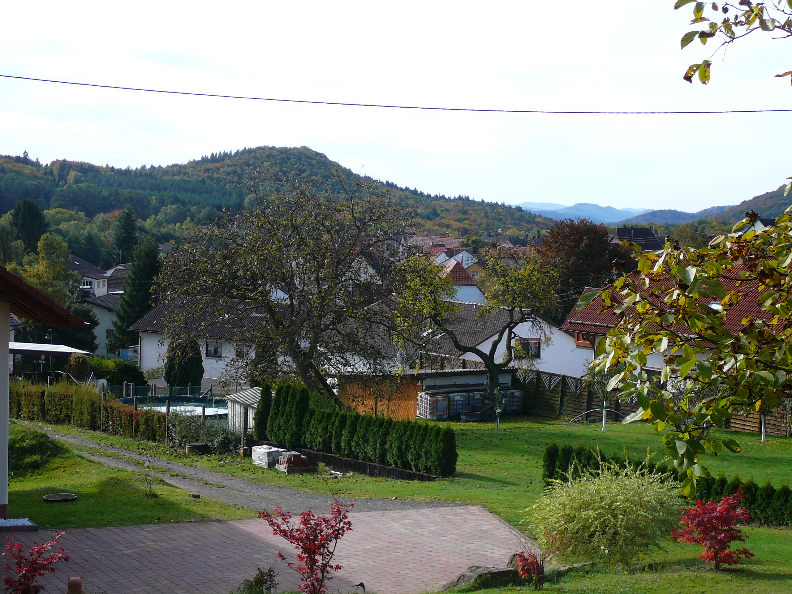 Blick über Leimen zum Kippkopf